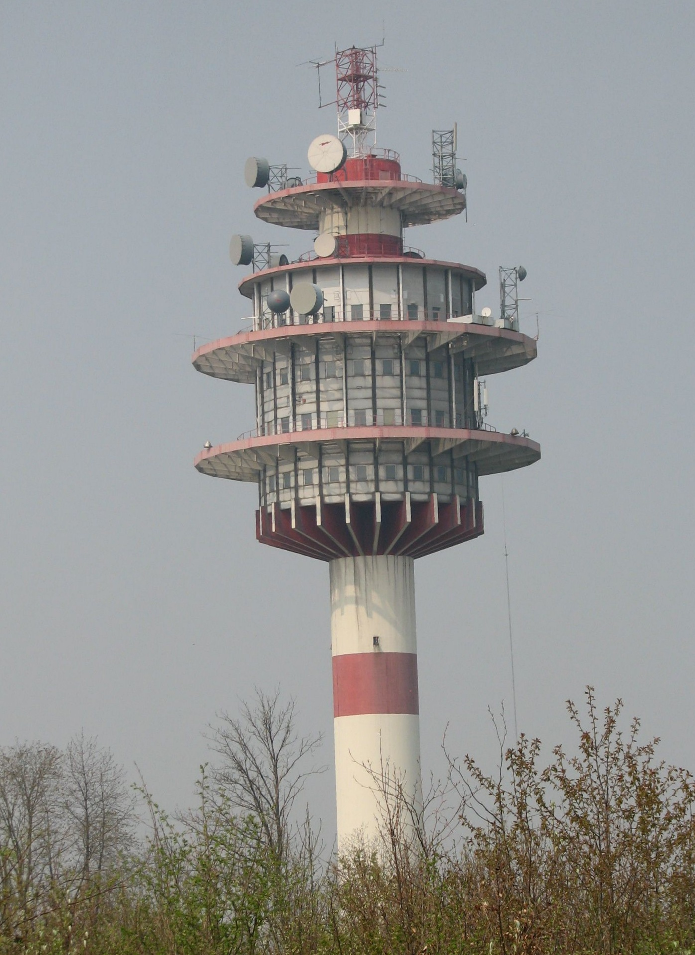 Emetteur de radiodiffusion du plateau de Ludres, Meurthe-et-Moselle (54)